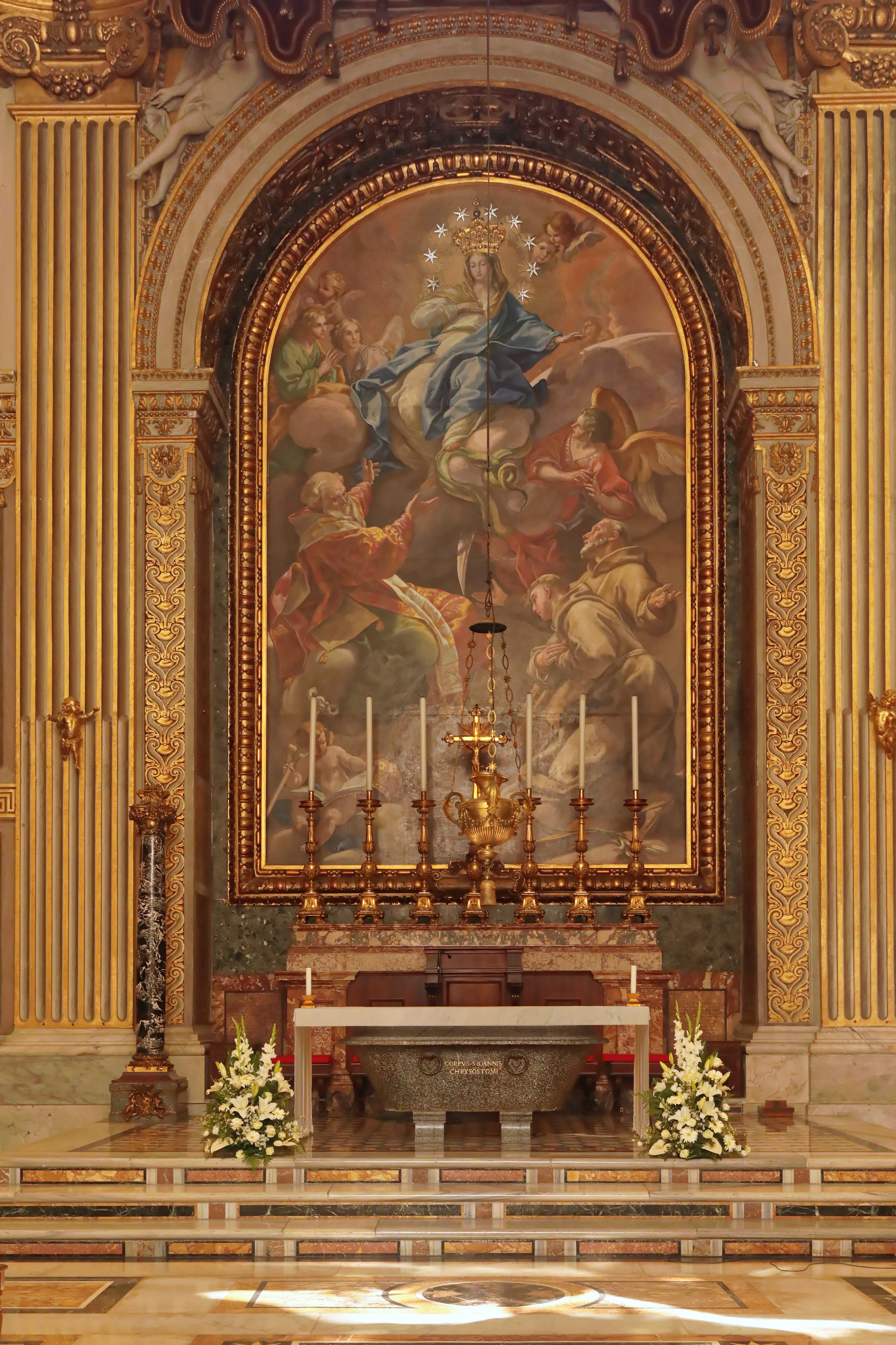 Seitenaltar